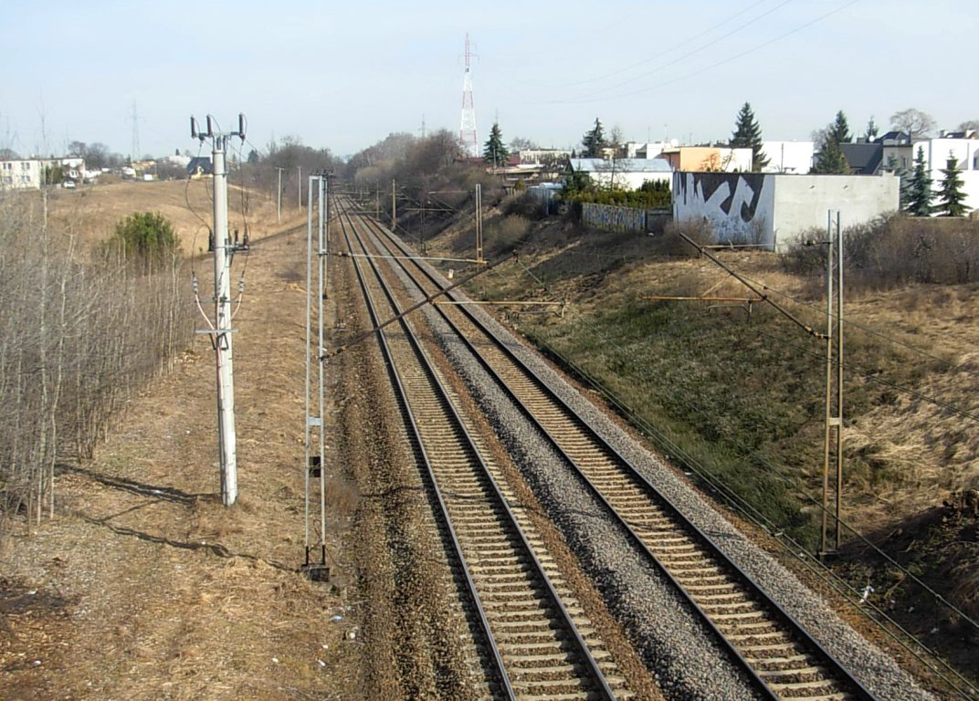 Linia kolejowa nr 131 Bydgoszcz-Inowrocław na os. Jary-Miedzyń w Bydgoszczy